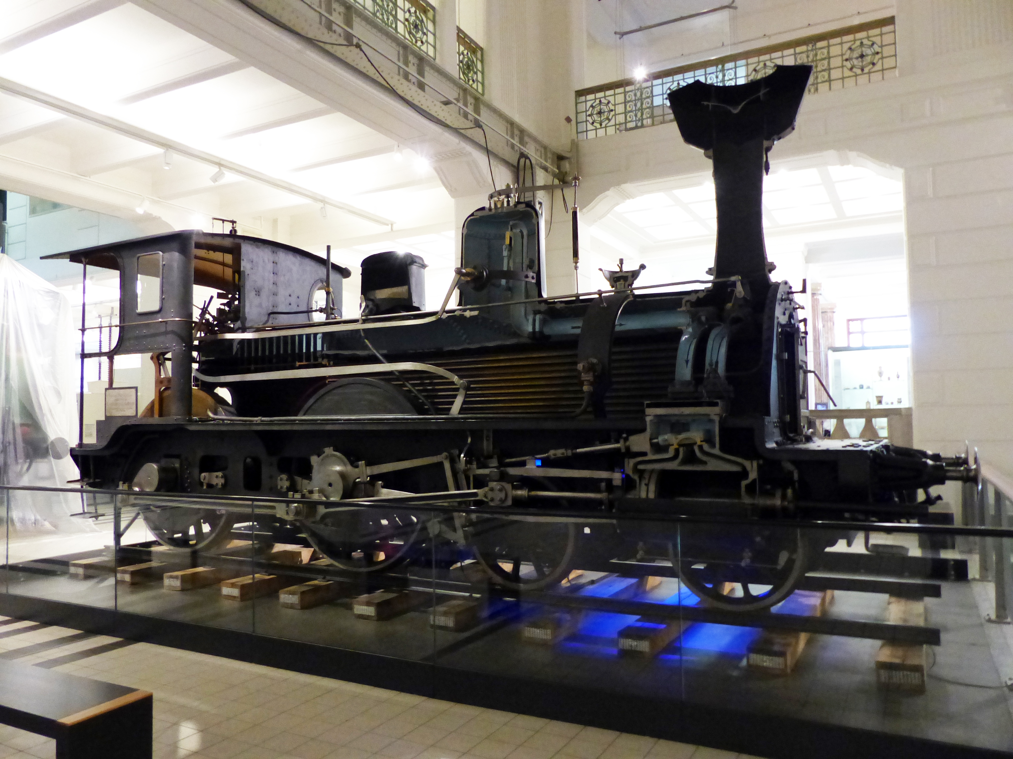 Dampflokomotive kkStB 1.20, 1883, gebaut in der Lokomotivfabrik Floridsdorf als AR 254 für die private Kronprinz-Rudolf-Bahn; Exponat im Technischen Museum Wien